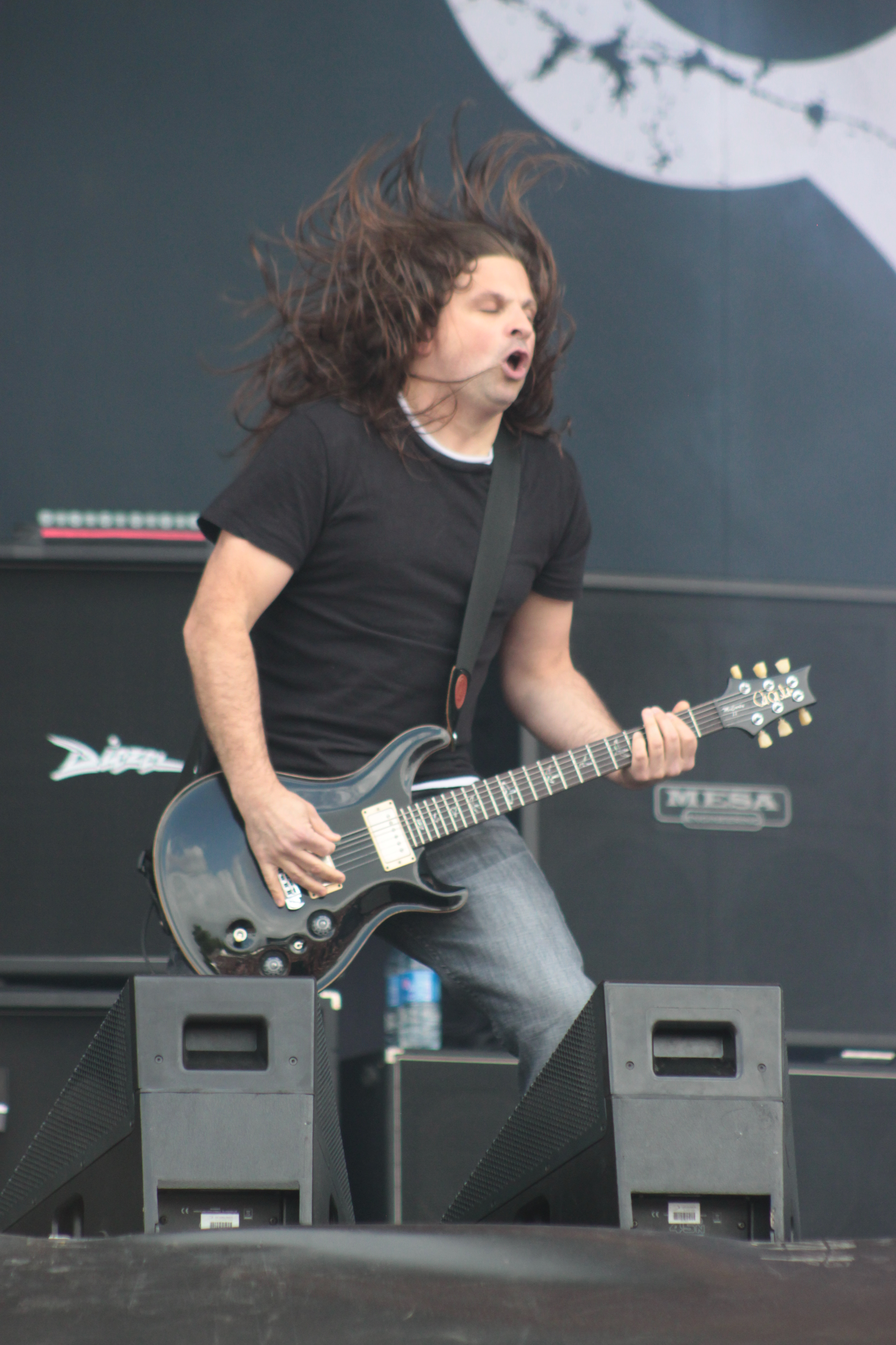 Newsted, Hellfest 2013, Fr-44-Clisson.